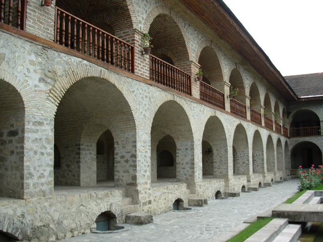 Карван-сарай, XVIII в., Шеки, Азербайджан